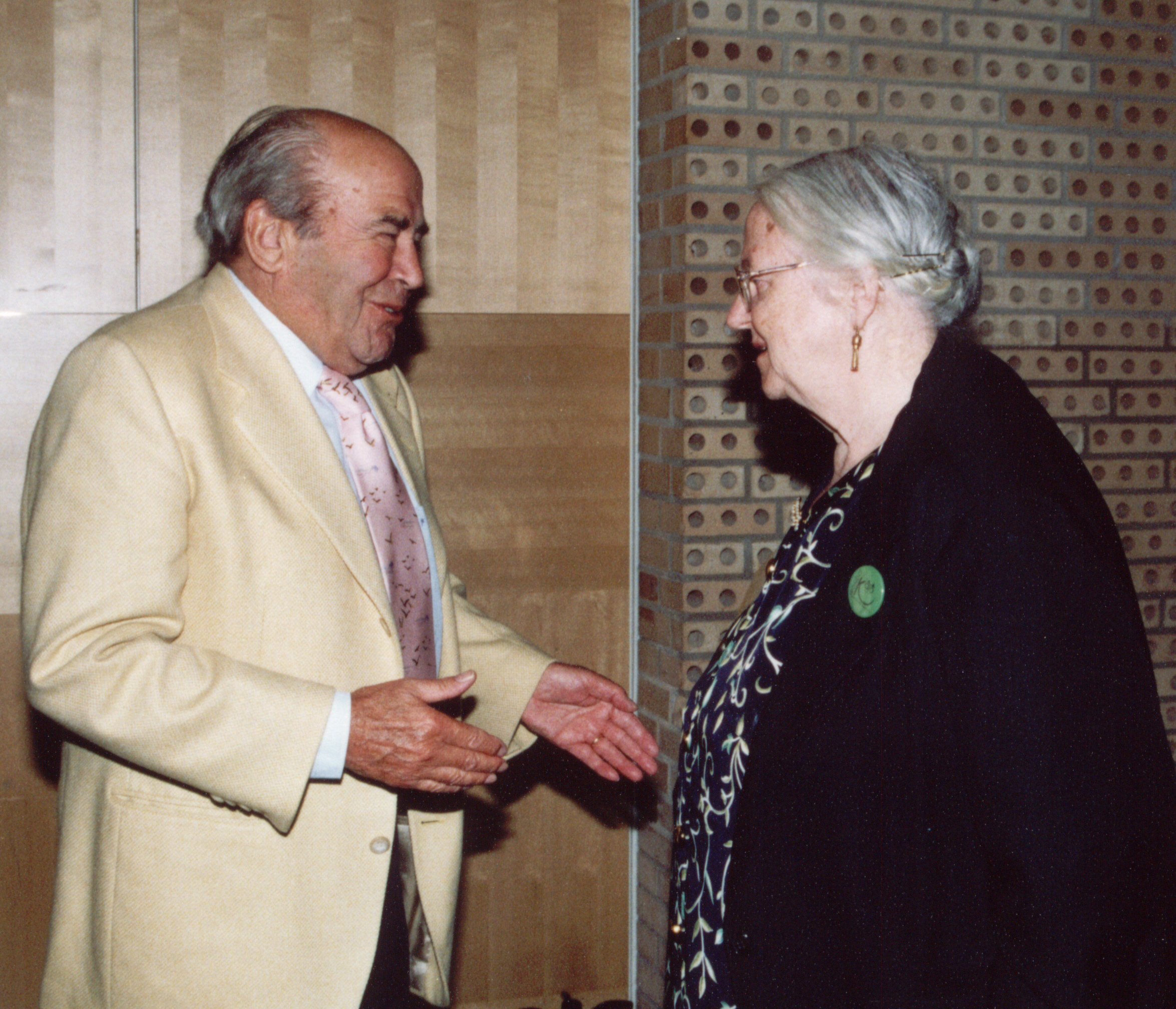 Universala Kongreso de Esperanto, Gotenburgo 2003. Louis-Christophe Zaleski-Zamenhof kaj Marjorie Boulton.